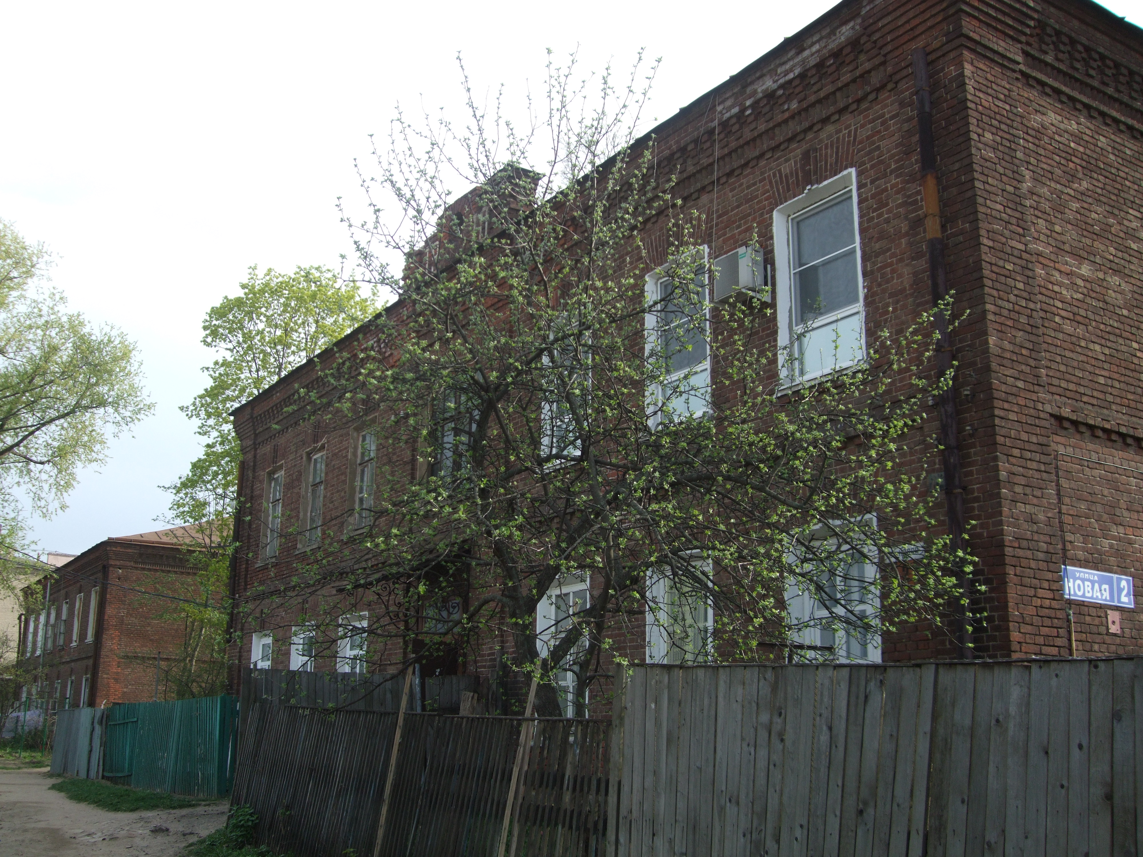 Посёлок Октябрьский (Россия, Московская область), Новая улица, дома, построенные до Октябрьской революции